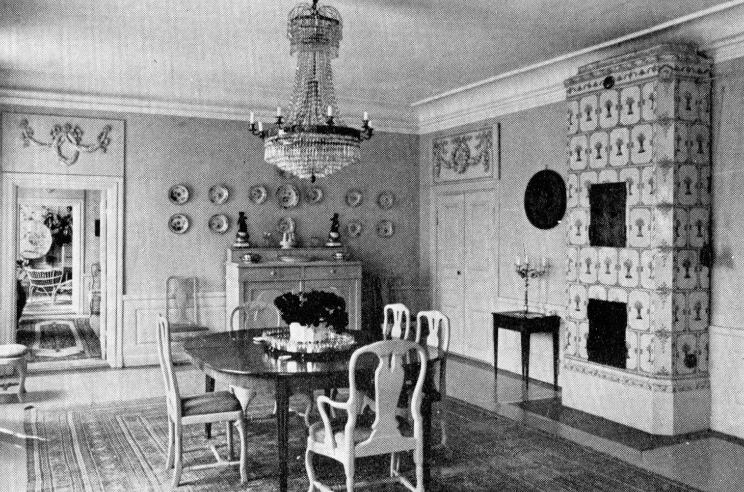 Ronöholms gård, matsal